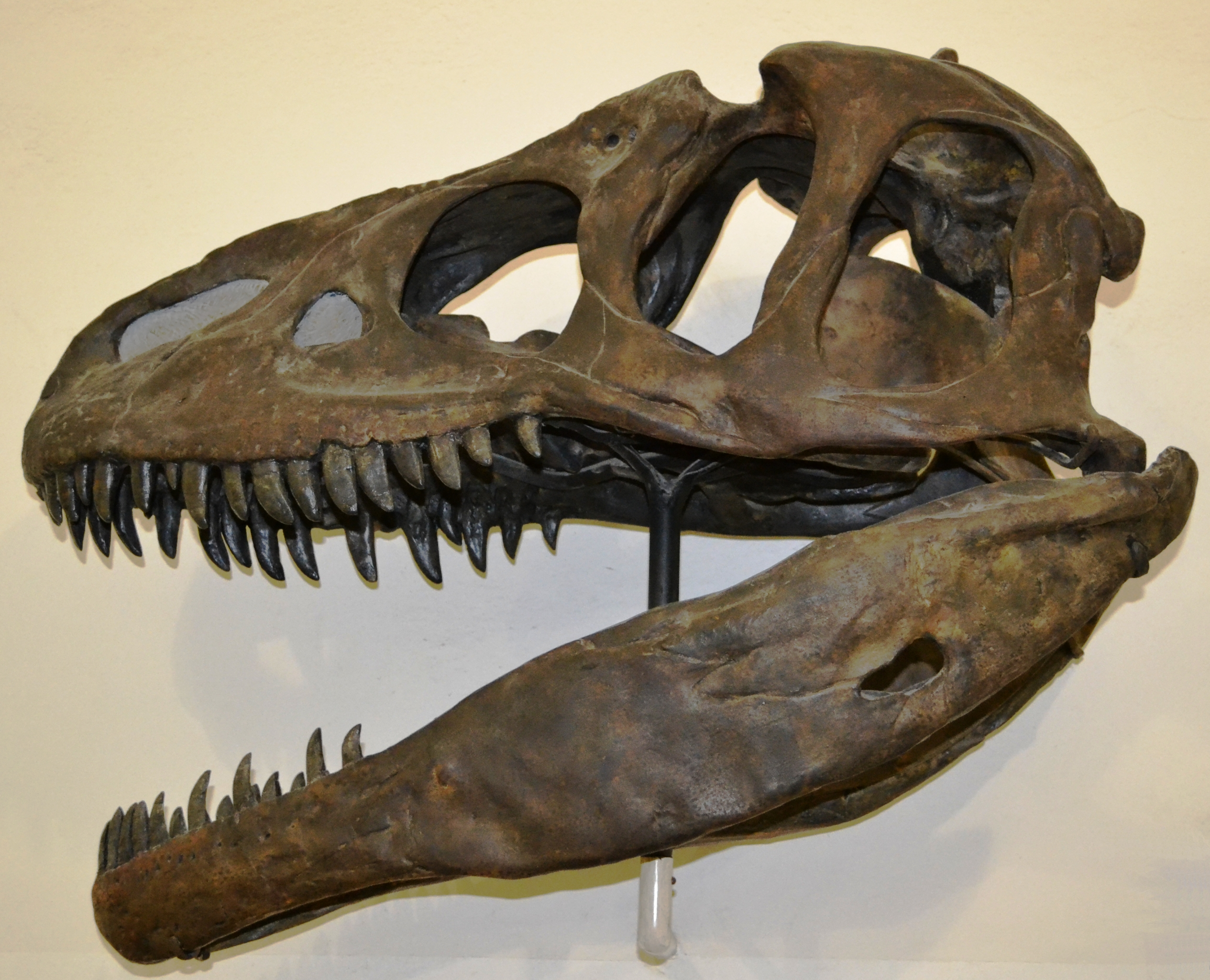 Raubsaurierschädel eines Allosaurus fragilis aus dem Oberjura, Morrison-Formation in Utah, USA.